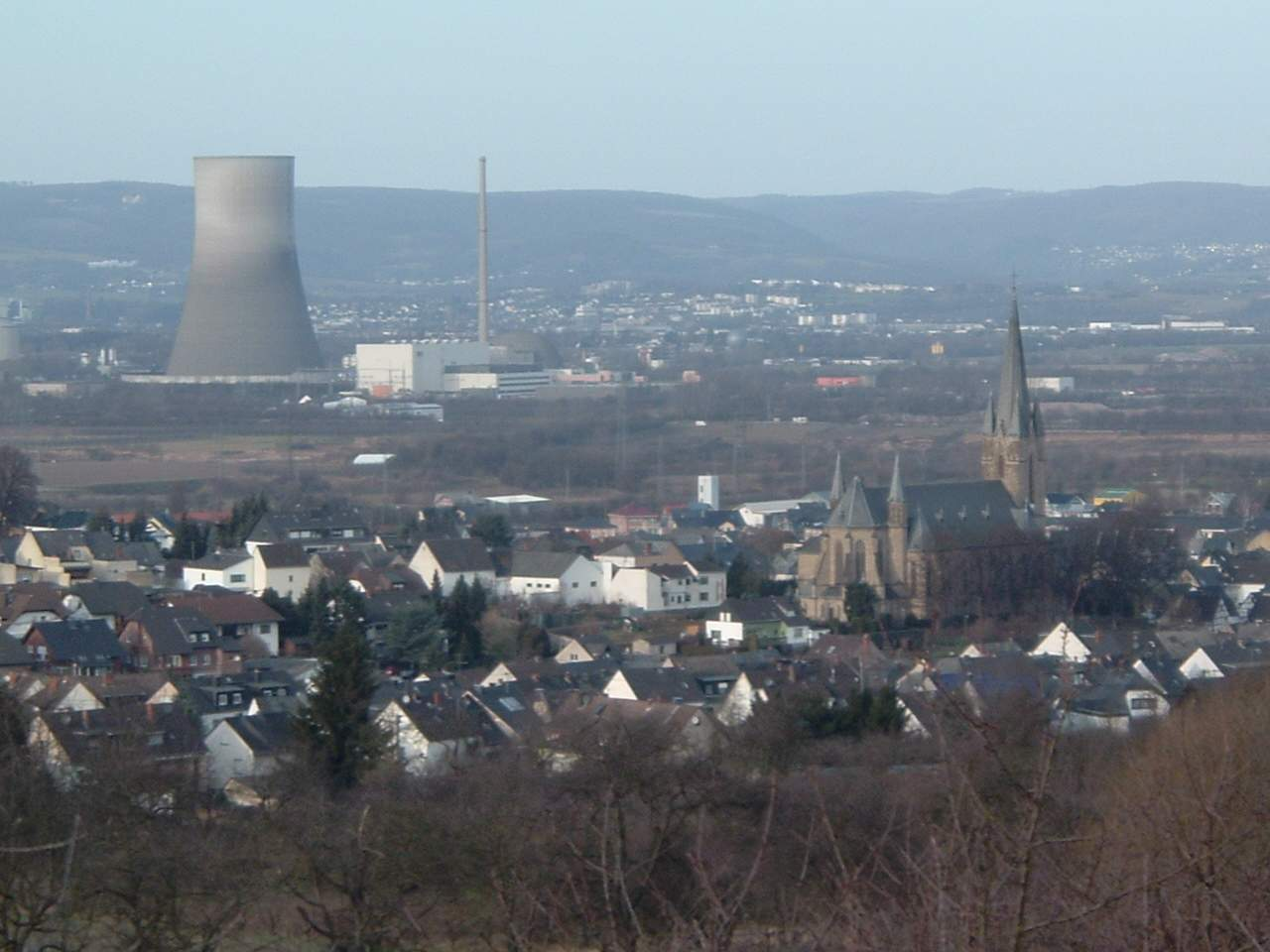 Mülheim-Kärlich Quelle: selbst fotografiert